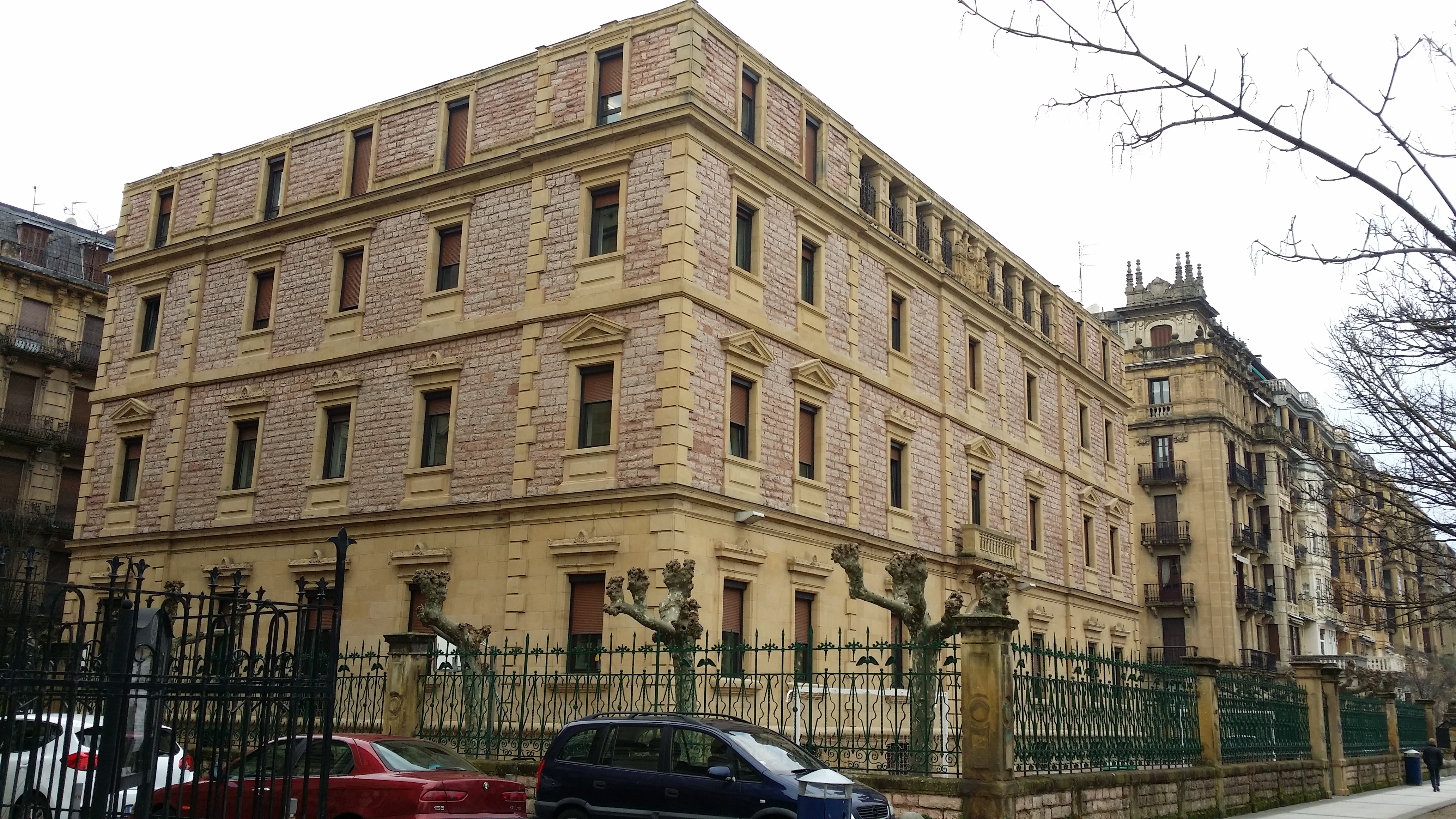 San Jose eskola (Donostia)